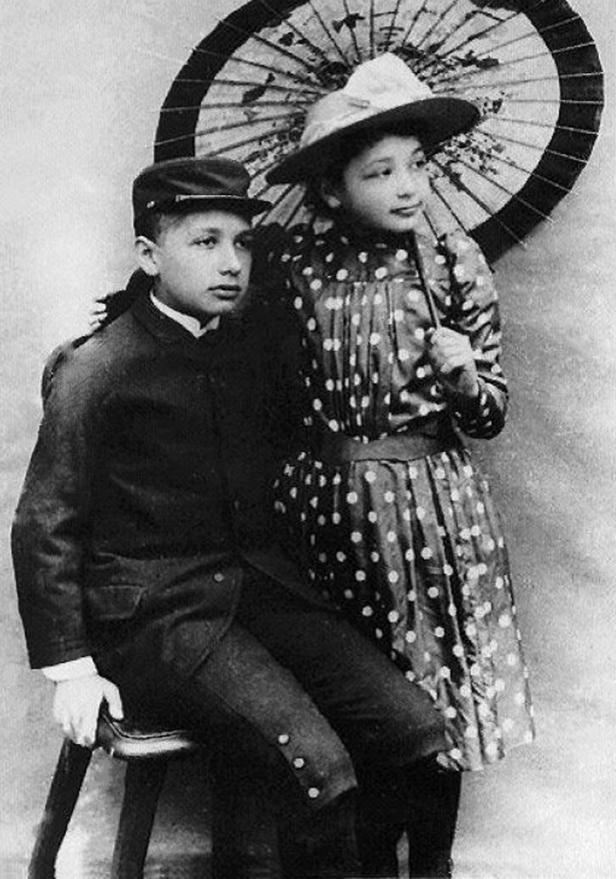 Maria "Maja" Einstein, sister of Albert Einstein